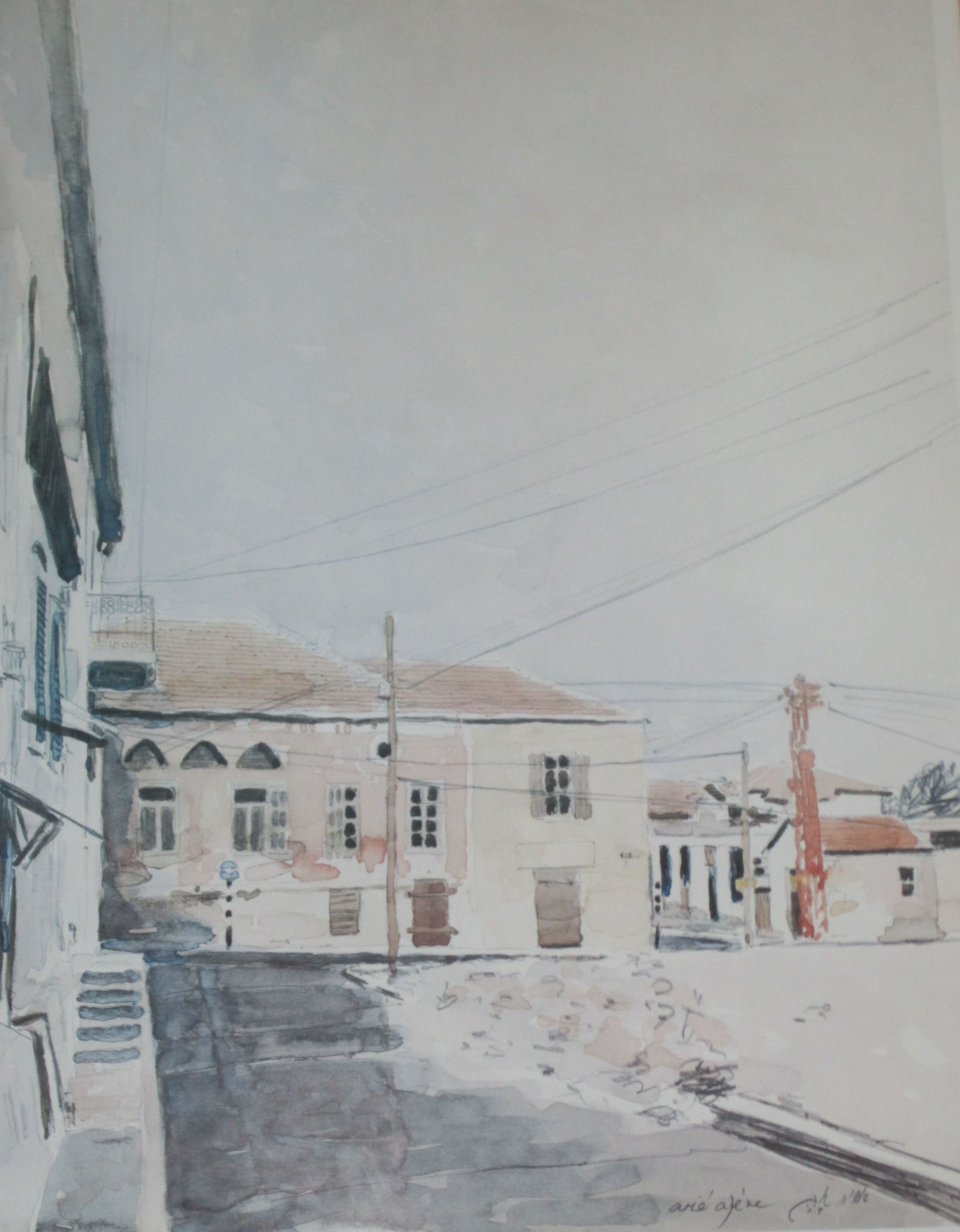 שלוש פינת יחאלי. ציור של אריה אזן.